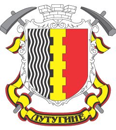 Герб города Лутугино (Луганская область)